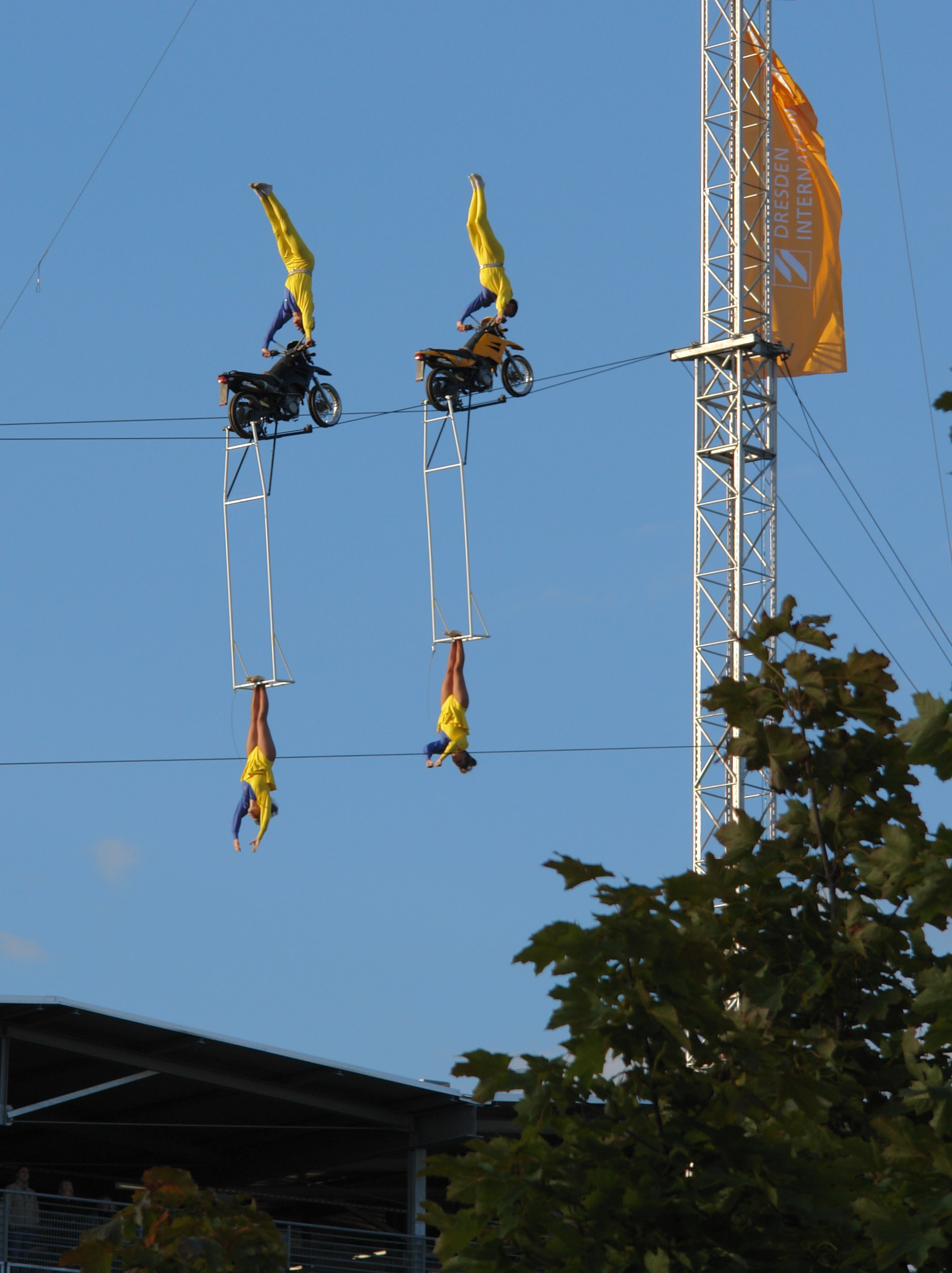 Geschwister Weisheit bei einer Hochseil-Darbietung am Flughafen Dresden